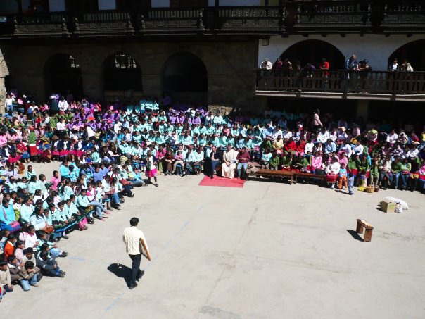 Oratorianos en Chacas